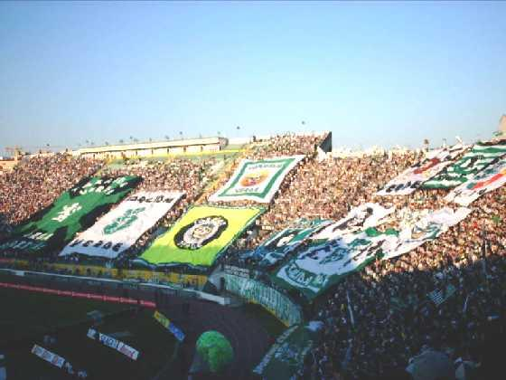 A Torcida Verde é uma claque apoiante do Sporting Clube de Portugal que foi formada em 11 de Novembro de 1984, e reconhecida oficialmente pelo clube em 1988.